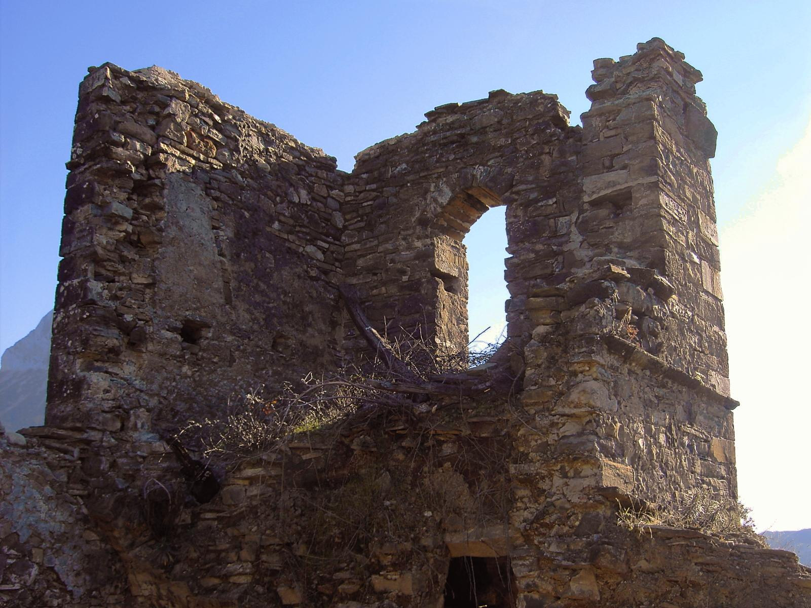 El campanario de la iglesia de Belsierre, que destruyeron en la Guerra Civil. Aragonés: O campanal d'a il·lésia de Belsierre, que destruyoron en a Guerra Cevil.